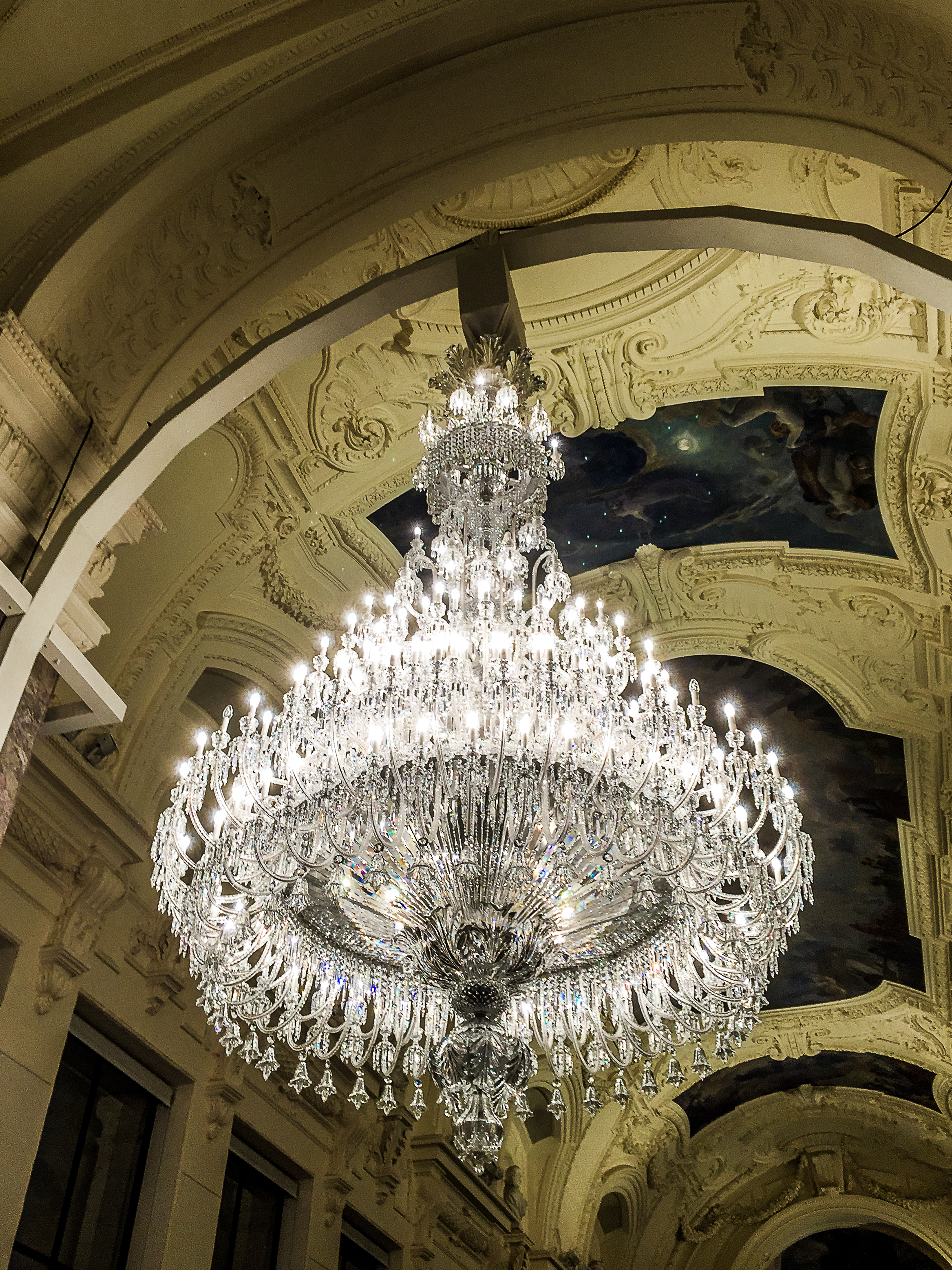 Exposition Baccarat au Petit Palais à Paris.